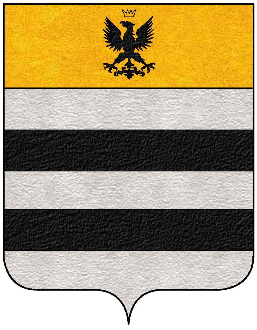 Stemma della famiglia Dovara